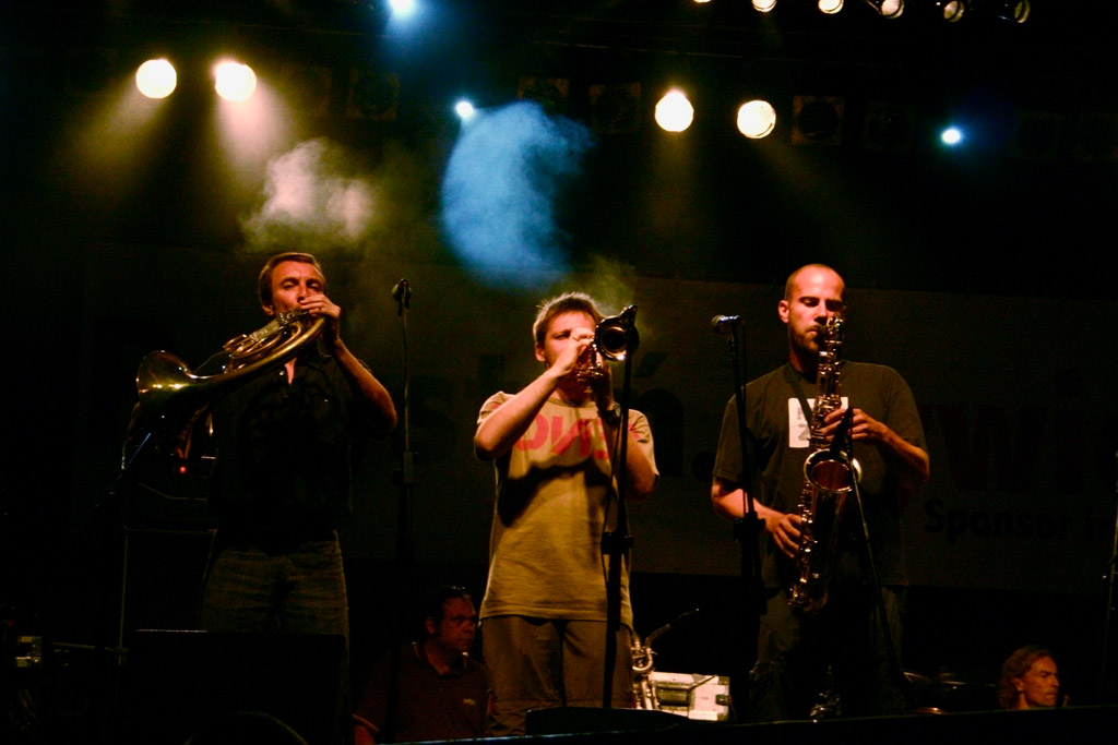 Koncert zespołu Kult podczas festiwalu FAMA, Świnoujście 22 lipca 2006